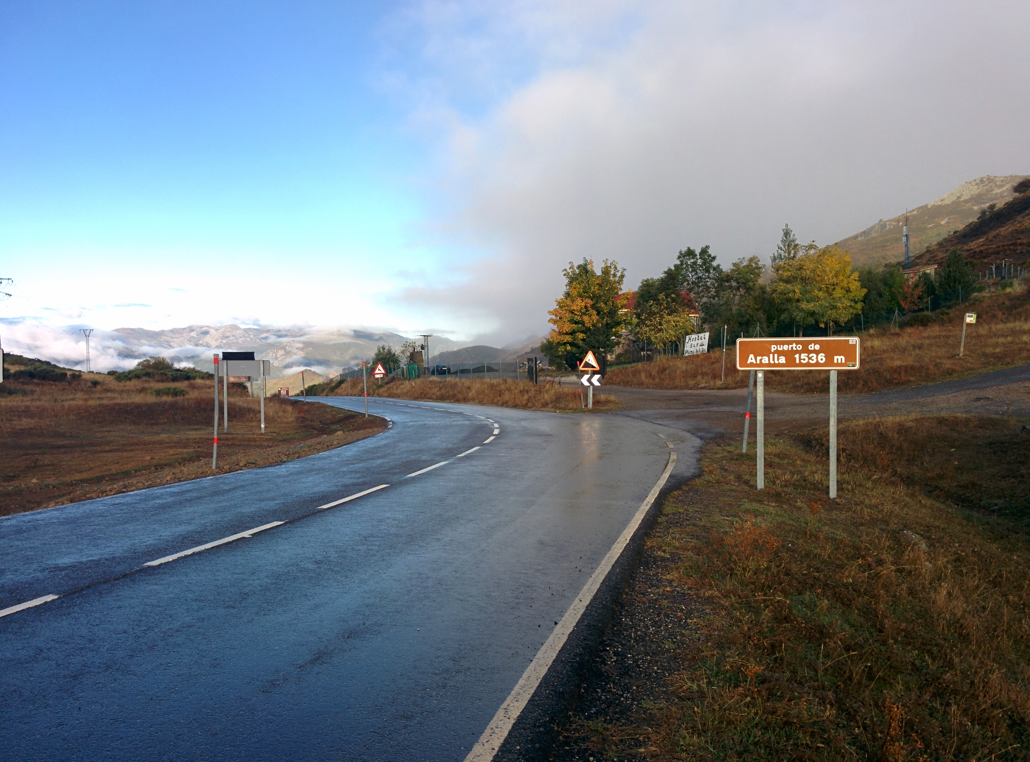 Alto del puerto de Aralla, en León (España).